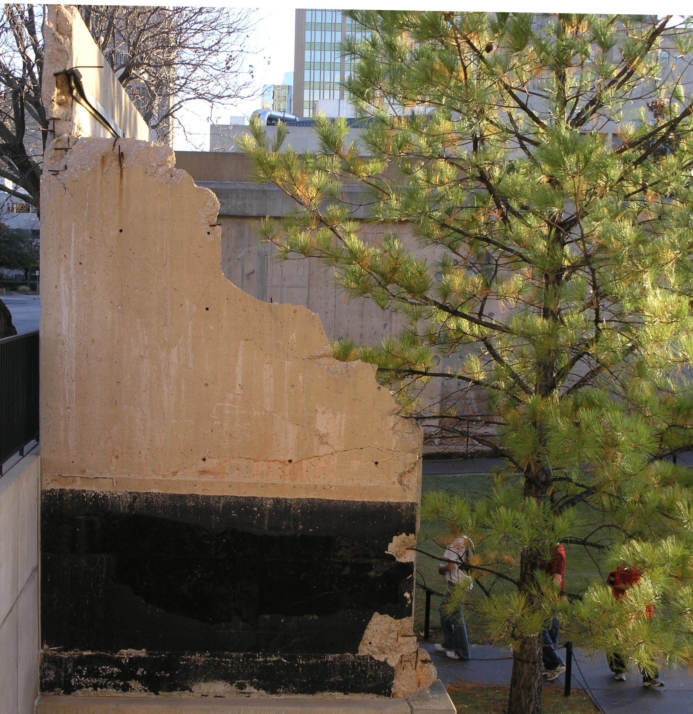 Oklahoma City